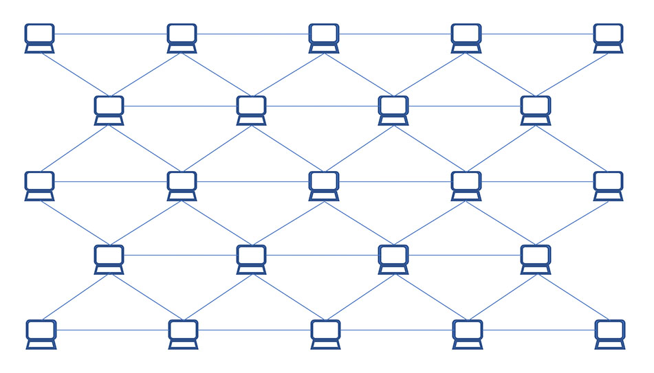 Sistem pencatatan transaksi dengan database tersebar (desentralisasi)